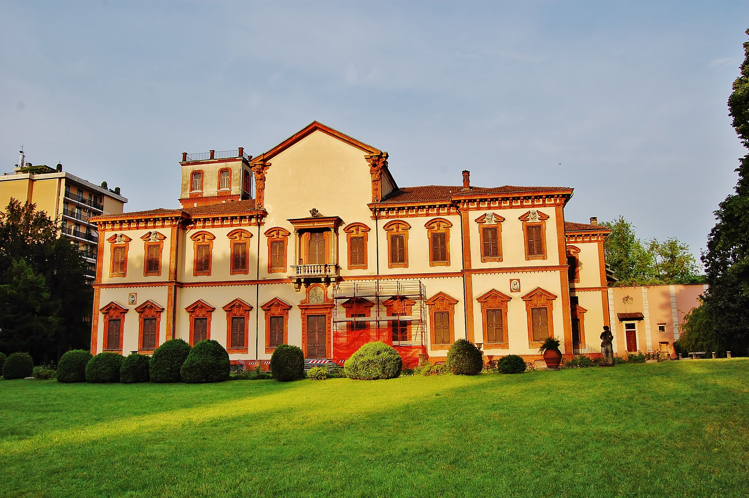 Villa Ghirlanda Silva (solo esterni) This is a photo of a monument which is part of cultural heritage of Italy.